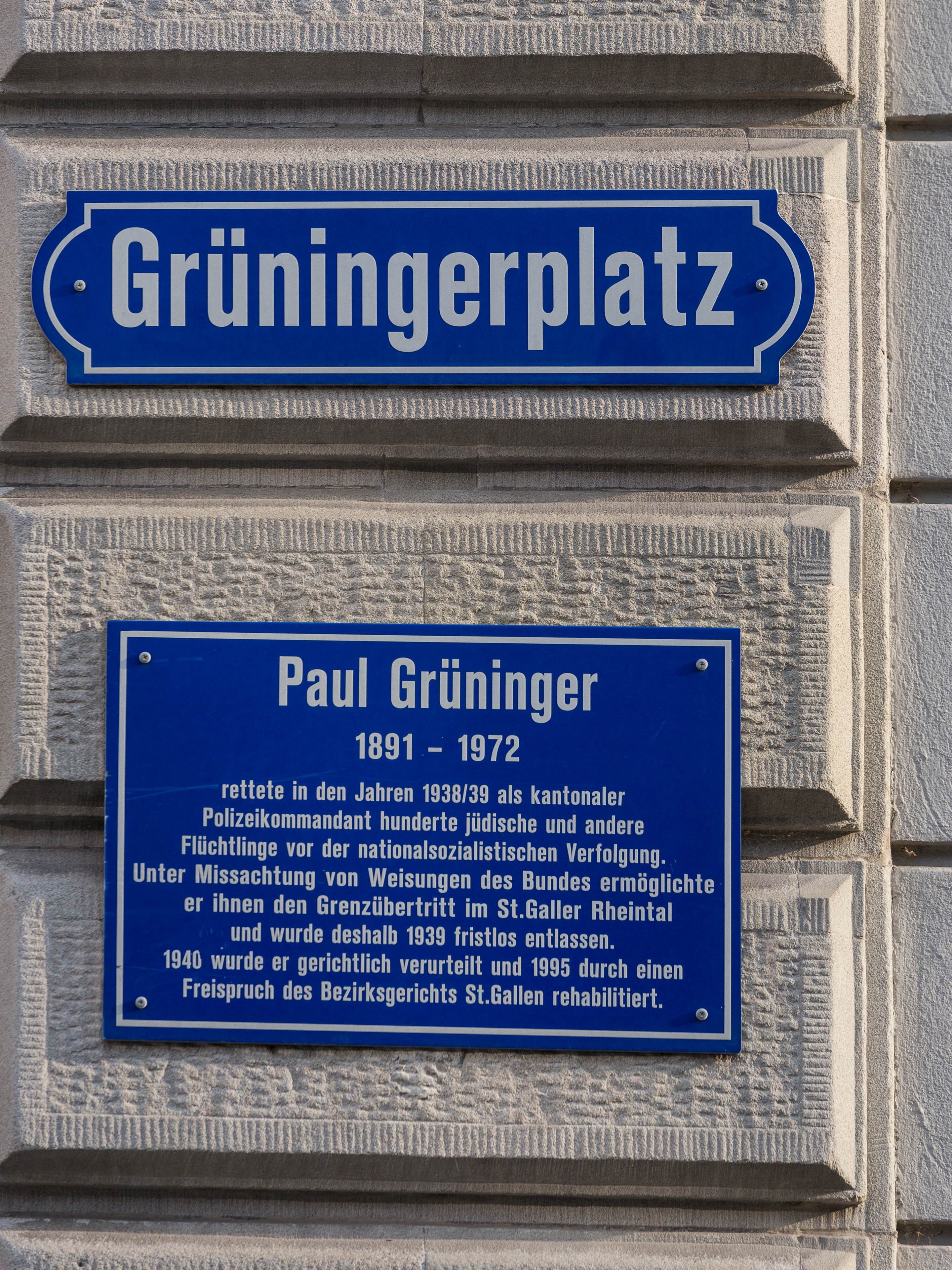 Grüningerplatz mit Gedenktafel in Sankt Gallen